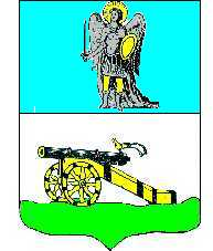 Герб рода Всеволожских